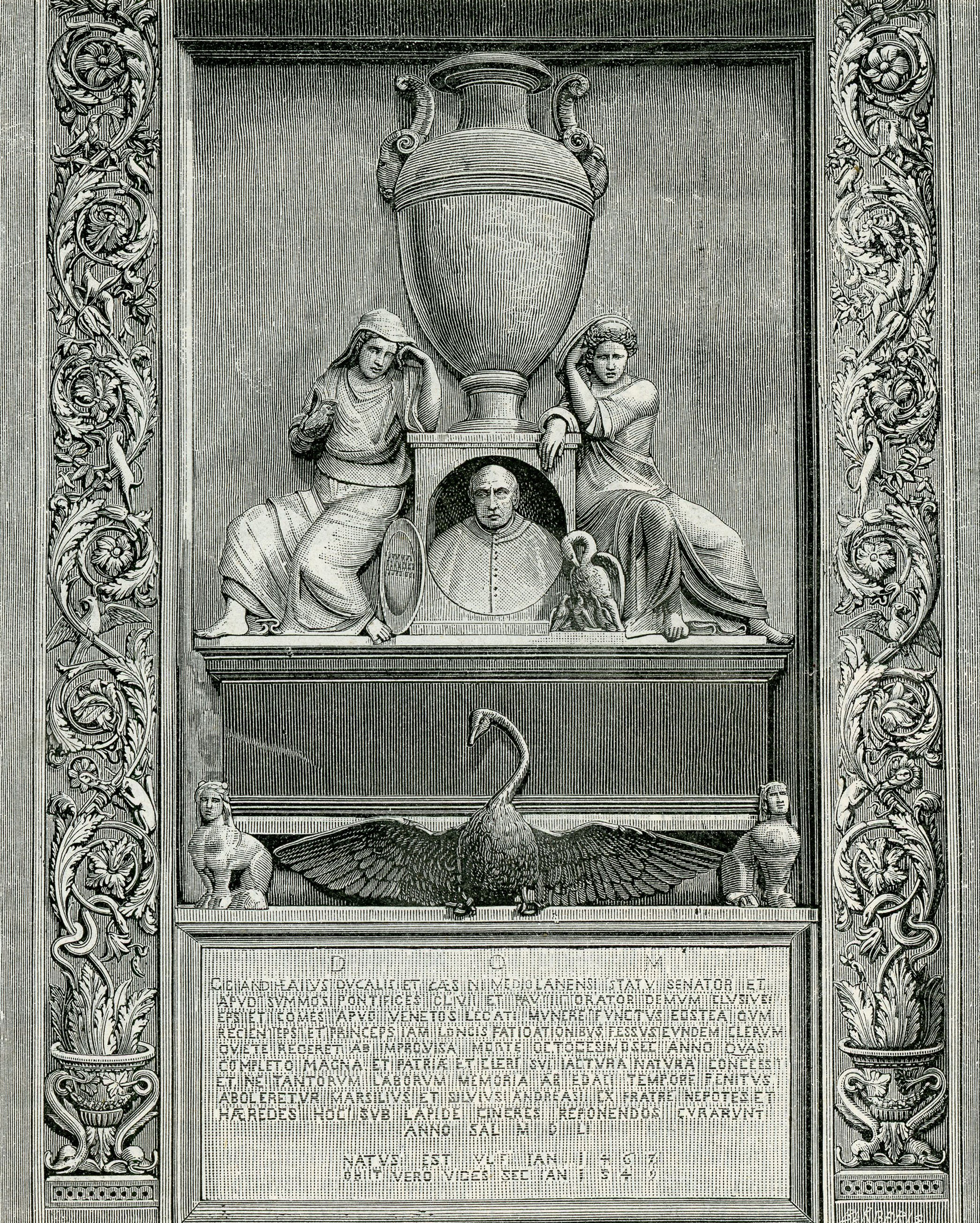 Mantova (Basilica di Sant’Andrea): Mausoleo al vescovo Giorgio Andreasi (xilografia di Giuseppe Barberis).